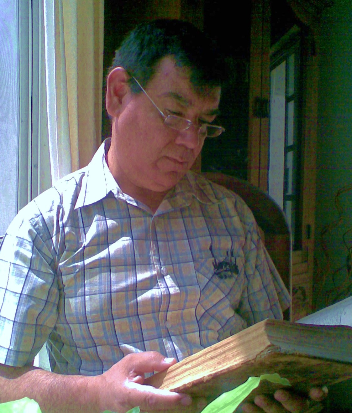 Fotografía de Arturo Ortega Morán